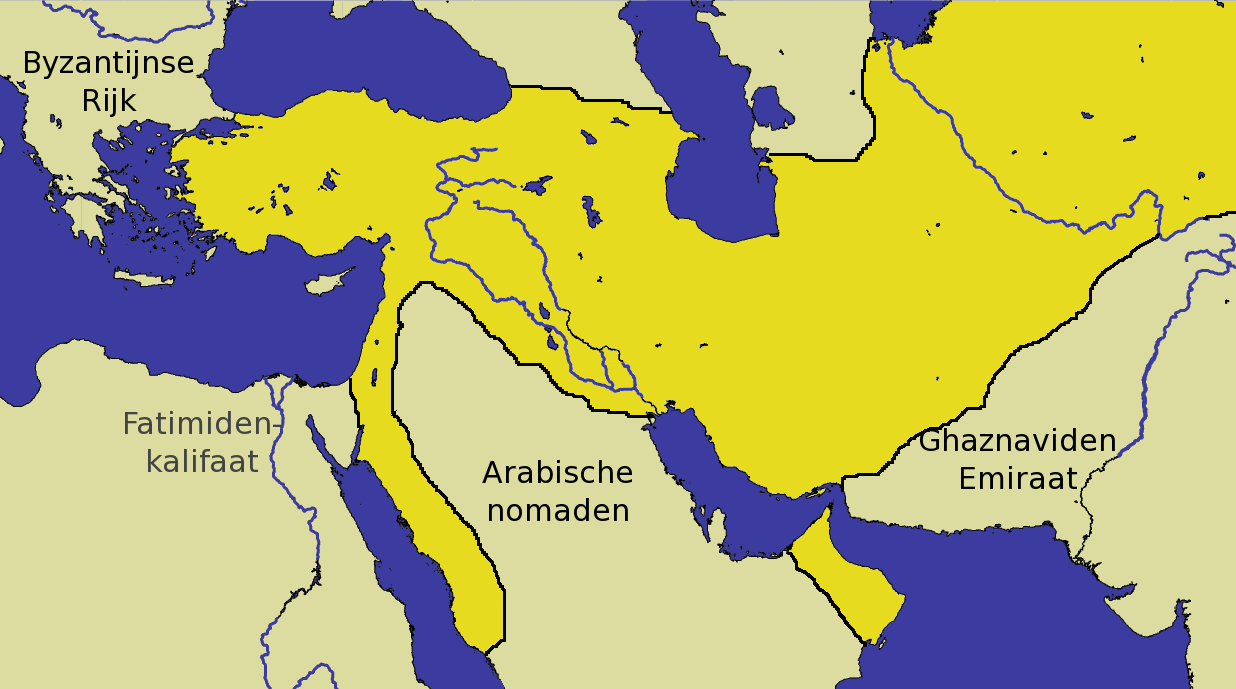 Het Seltsjoekenrijk op het toppunt van haar macht in nl:1092, ten tijde van de dood van Malik Sjah I. Na diens dood viel het rijk uiteen in verschillende staatjes.